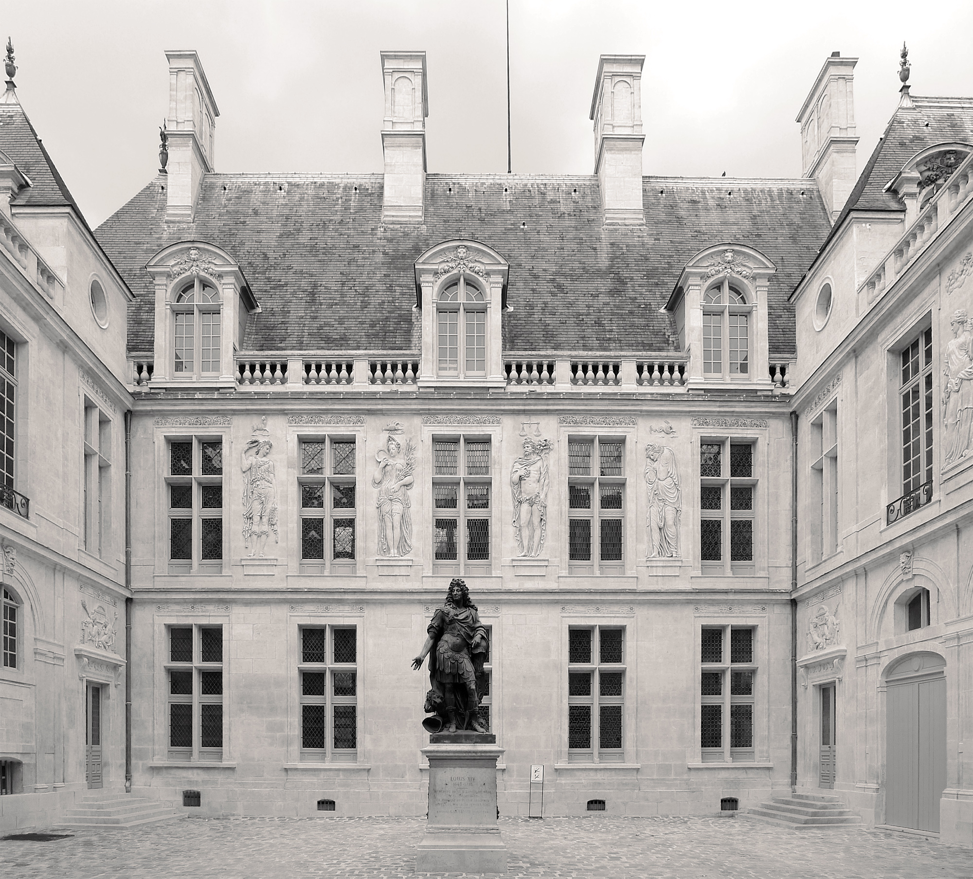 Cour d'entrée de l'hôtel Carnavalet (musée Carnavalet), avec en son centre le "Louis XIV écrasant la Fronde" d'Antoine Coysevox - Paris III